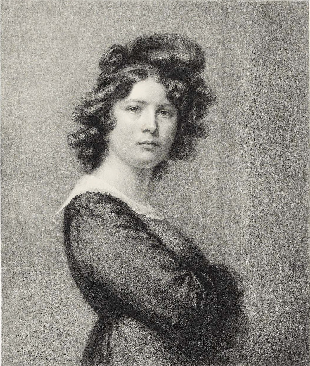 autoportrait gravé